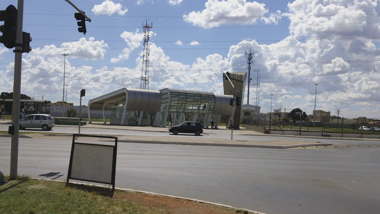 Estação Guará - Metrô do Distrito Federal, Brasil